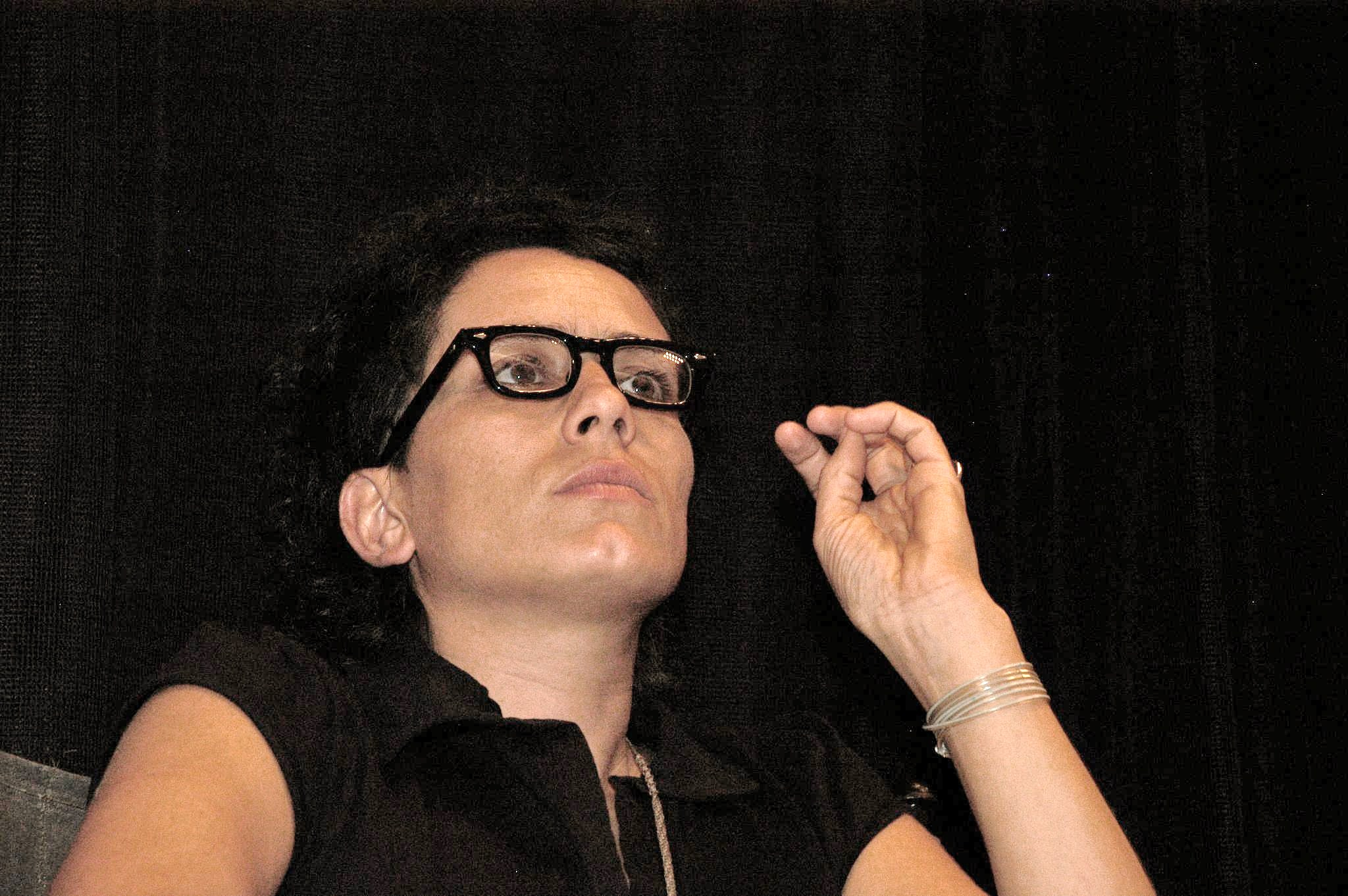 Guadalajara, Jalisco, 13 de marzo de 2008. Albertina Carri, directora de La rabia.